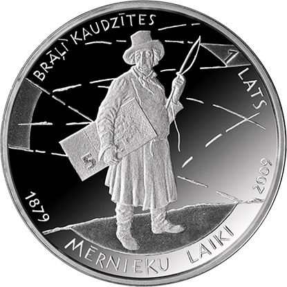 Lats commemorative coin